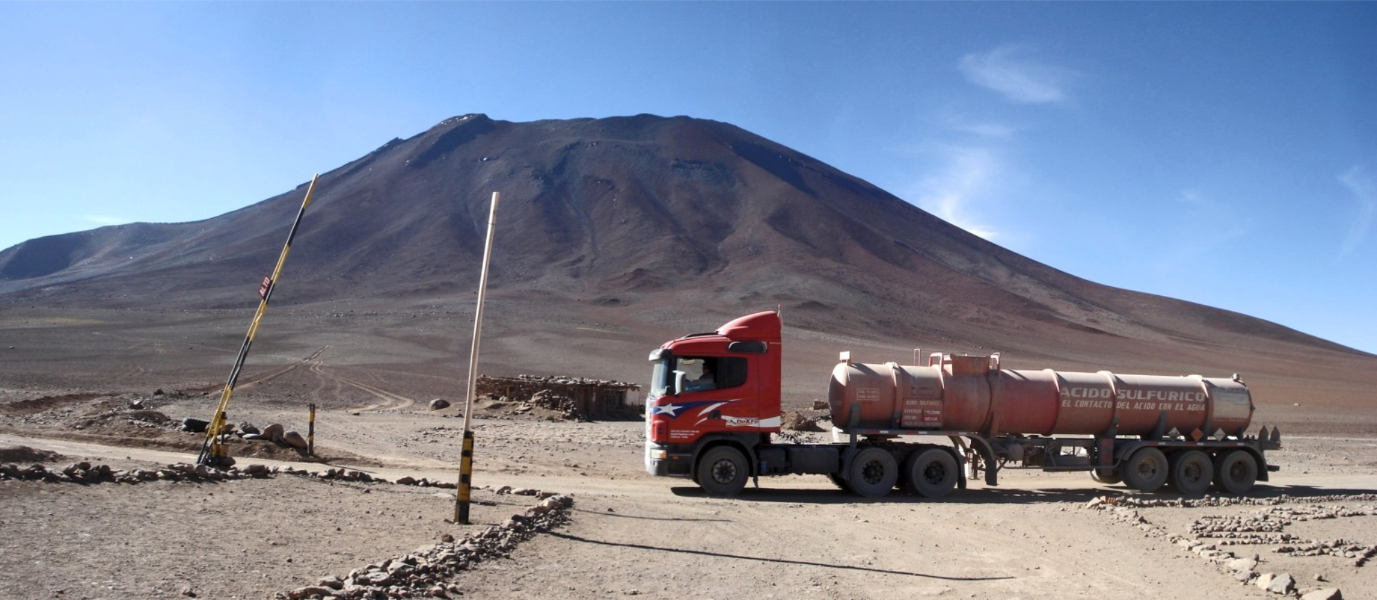 Jurisques Südostflanke von Grenzstation Chile / Bolivien